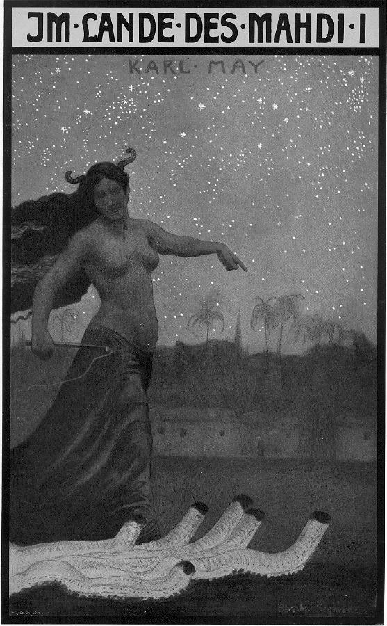 Buchdeckel des Romans Im Lande des Mahdi I von Karl May. Ausgabe von 1905, gestaltet von Sascha Schneider.